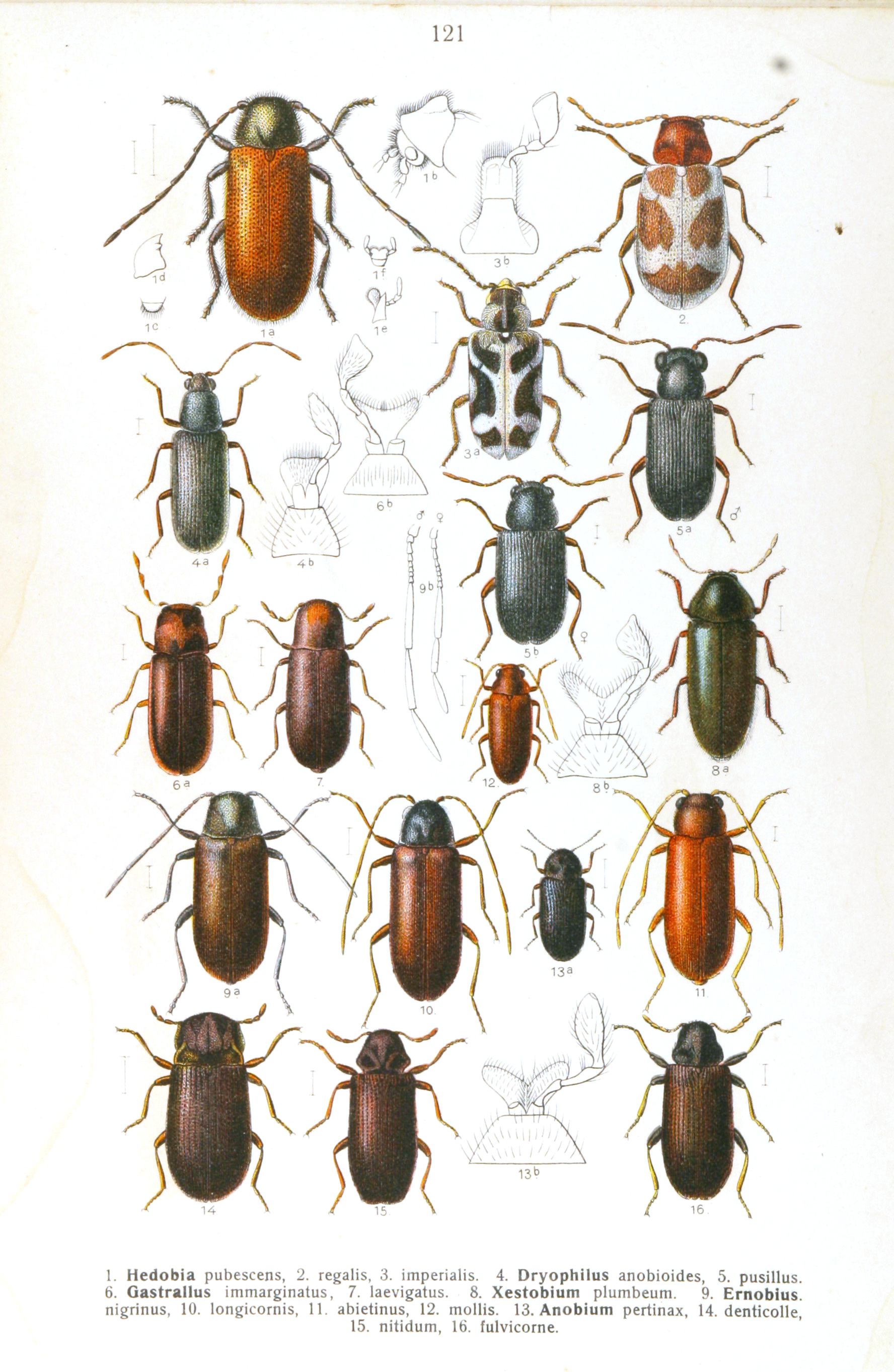 See image for index to numbers. Hedobia pubescens Fbr. = Hedobia pubescens (Olivier, 1790) (1a: adult, dorsal view, 1b: head and metathorax, lateral view, 1c: labrum, dorsal view, 1d: mandible, 1e: maxilla, 1f: labium, ventral view) [Hedobia] regalis Duft. = Ptinomorphus regalis (Duftschmid, 1825), adult, dorsal view [Hedobia] imperialis Lin. = Ptinomorphus imperialis (Linnaeus, 1767) (3a: adult, dorsal view, 3b: labium, dorsal view) Dryophilus anobioides Chevrl. = Dryophilus anobioides Chevrolat, 1832 (4a: adult, dorsal view, 4b: labium, dorsal view) [Dryophilus] pusillus Gyll. = Dryophilus pusillus (Gyllenhal, 1808) (5a: adult male, dorsal view, 5b: adult female, dorsal view) Gastrallus immarginatus Müll. = Gastrallus immarginatus (P.W.J.Müller, 1821) (6a: adult, dorsal view, 6b: labium, dorsal view) [Gastrallus] laevigatus Oliv. = Gastrallus laevigatus (Olivier, 1790), adult, dorsal view Xestobium plumbeum Illig. = Xestobium plumbeum (Illiger, 1801) (8a: adult, dorsal view, 8b: labium, dorsal view) Ernobius nigrinus Strm. = Ernobius nigrinus (Sturm, 1837) (9a: adult, dorsal view, 9b: antennae of male and female) [Ernobius] abietinus Gyll. = Ernobius abietinus (Gyllenhal, 1808), adult, dorsal view [Ernobius] mollis Lin. = Ernobius mollis (Linnaeus, 1758), adult, dorsal view Anobium pertinax Lin. = Hadrobregmus pertinax (Linnaeus, 1758), adult, dorsal view [Anobium] denticolle [sic] Panz. = Hadrobregmus denticollis (Creutzer in Panzer, 1796) (13a: adult, dorsal view, 13b: labium, dorsal view) [Anobium] nitidum Hrbst. (non Fabricius, 1792: preoccupied) = Hemicoelus sp., adult, dorsal view [Anobium] fulvicorne [sic] Strm. = Hemicoelus fulvicornis (Sturm, 1837), adult, dorsal view